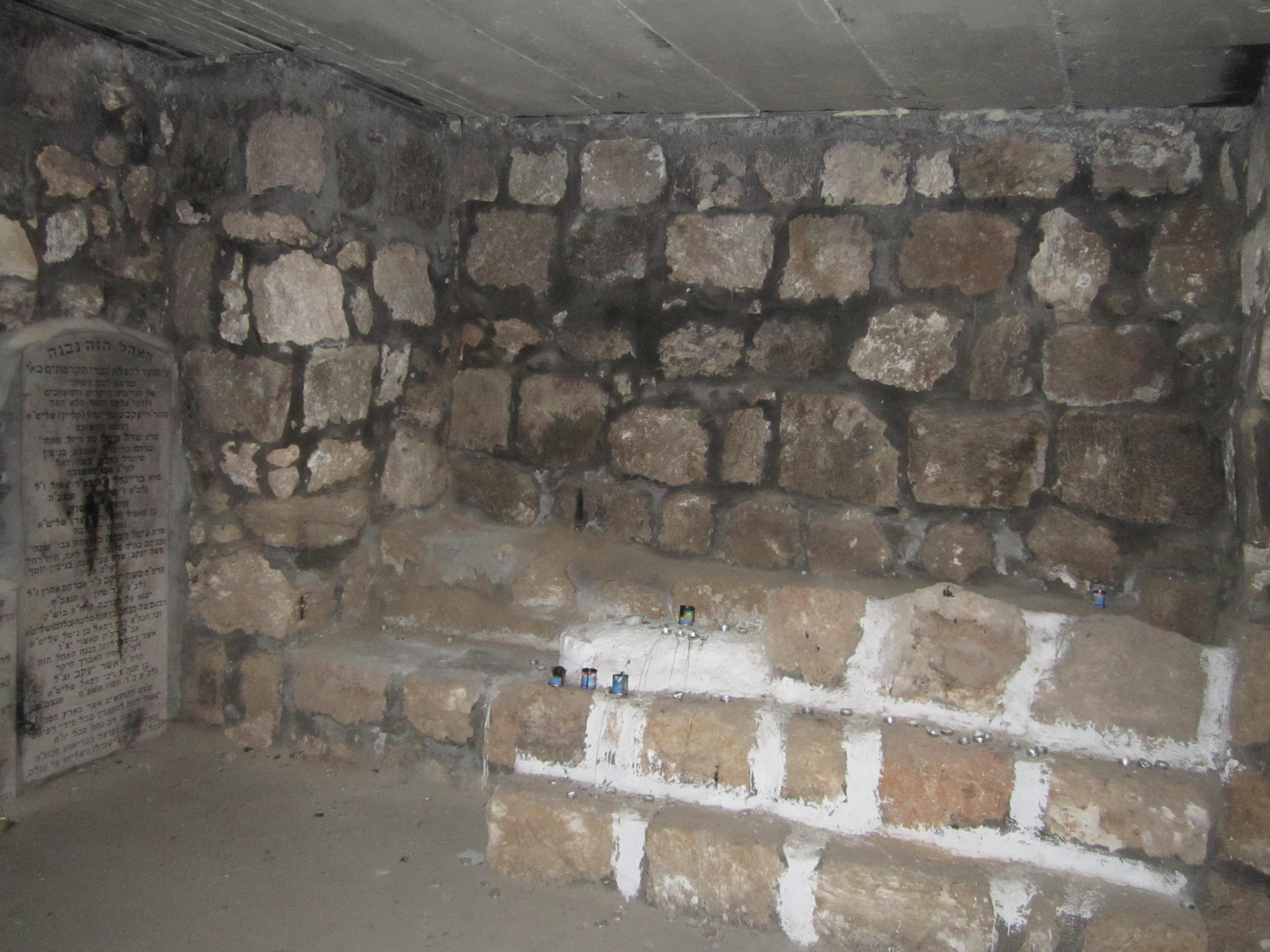 קבר האבן עזרא ביישוב כאבול